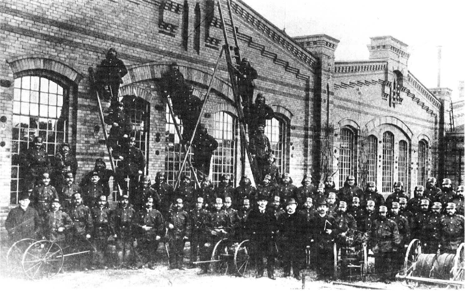 1904 gegründete Betriebsfeuerwehr des RAW Salbke